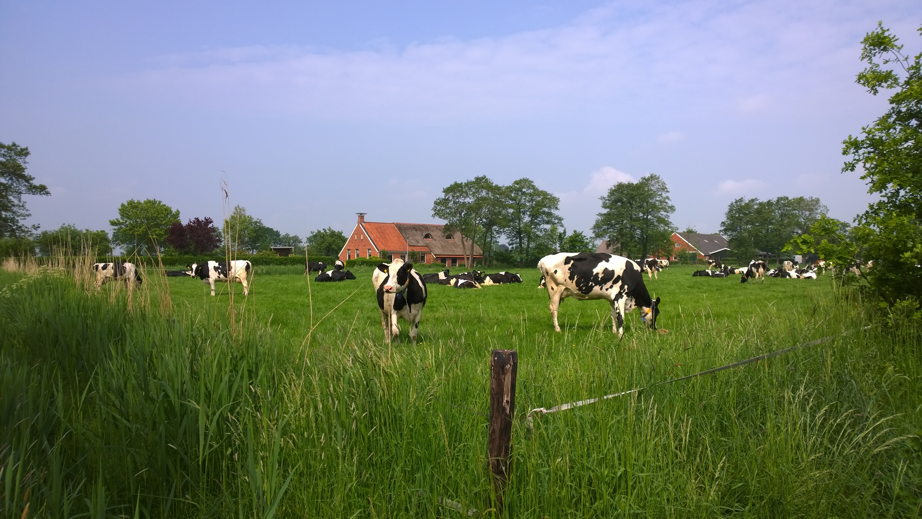 Koeien bij Sandebuur